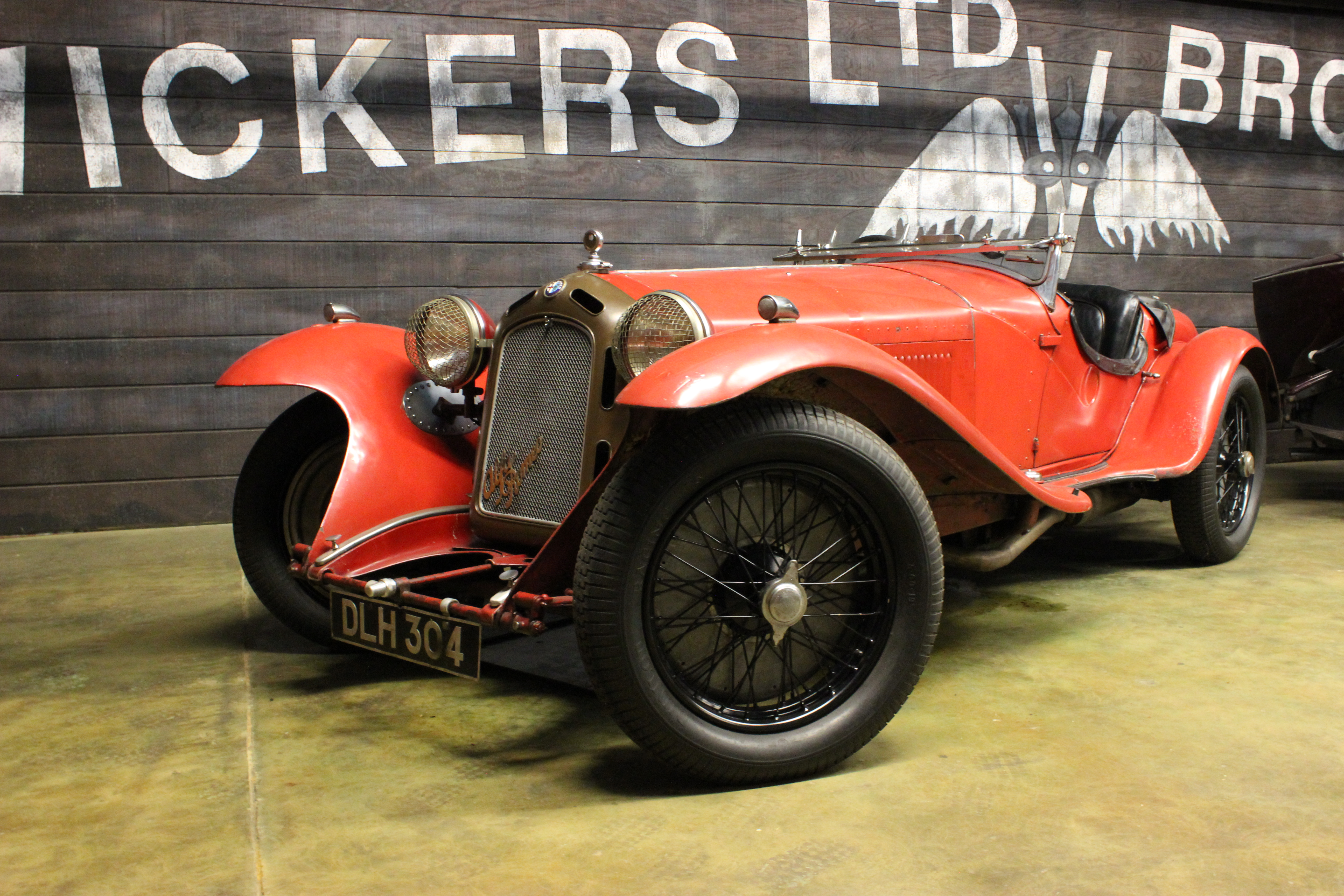 Alfa Romeo 8C Spyder